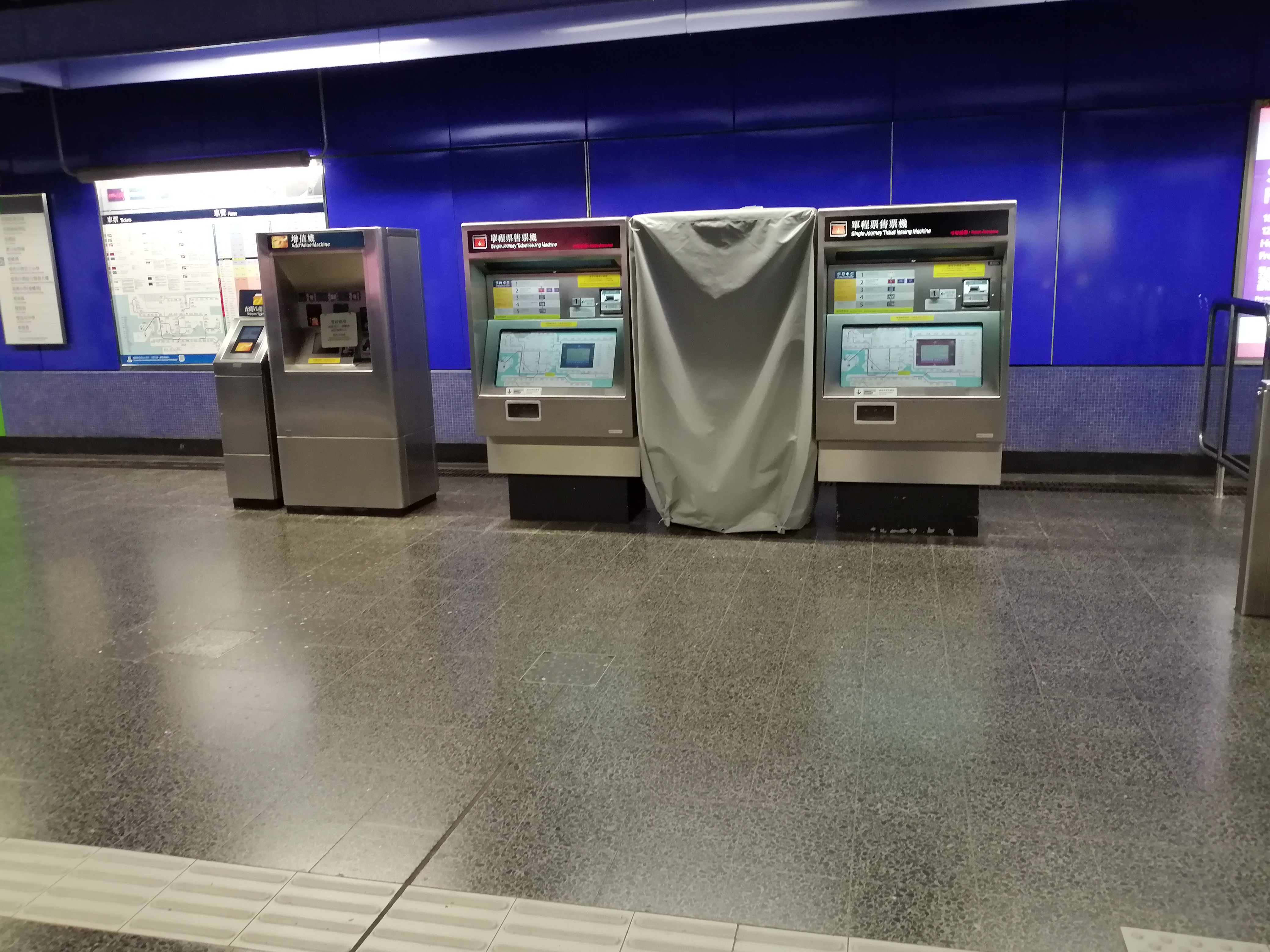 中文（香港）: 筲箕灣站遭到破壞的售票機